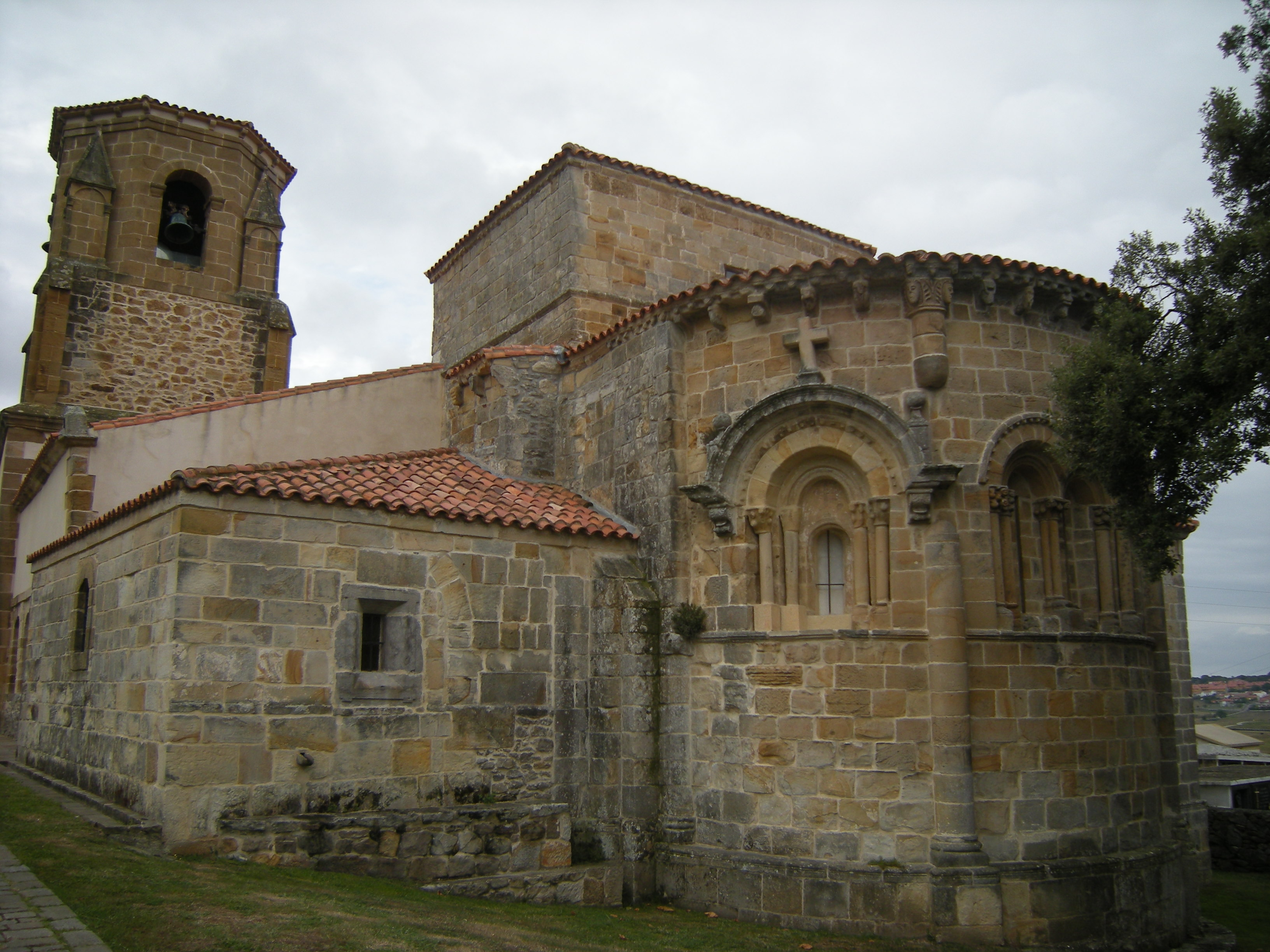 Iglesia románica de Santa María de Bareyo (Cantabria, España).